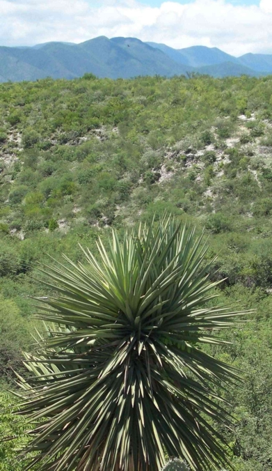 Pita-(subgénero)de la familia de las Palmas (términos regionales) Pertenece a la familia de los agaves su nombre científico es Yucca treculeana